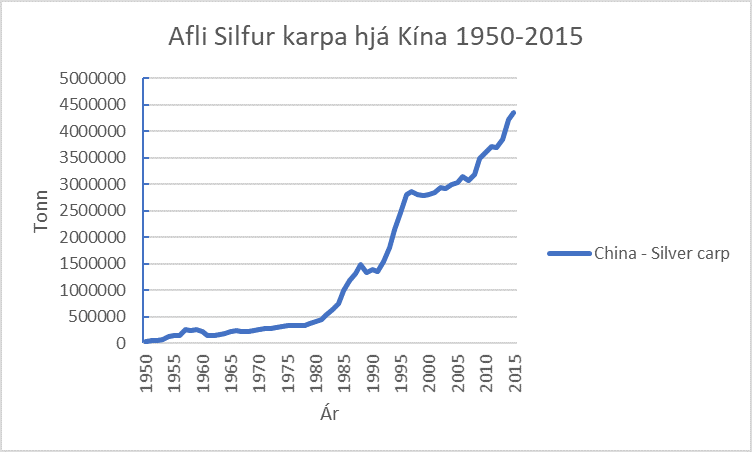 Afli silfur karpa hjá Kína frá 1950 til 2015.